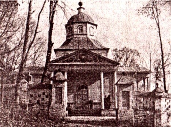 Церква Різдва Йоана Предтечі, де була охрещена Марія. Church of Nativity of John the Baptist, which was baptized Marie Bashkirtseff.